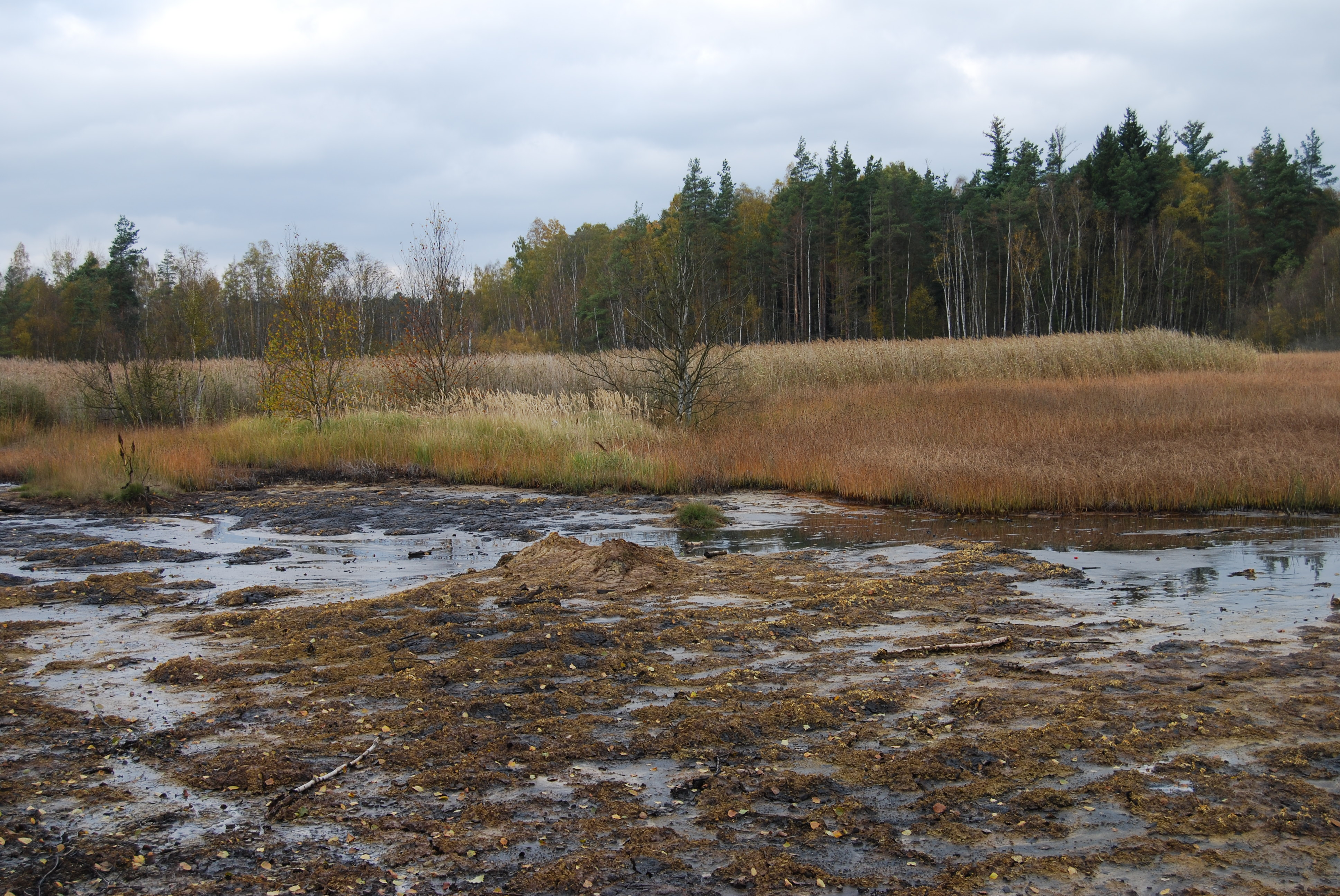 Národní přírodní rezervace Soos na sever od Františkových Lázní, z větší části na území Skalné. Okres CHeb. Čechy.